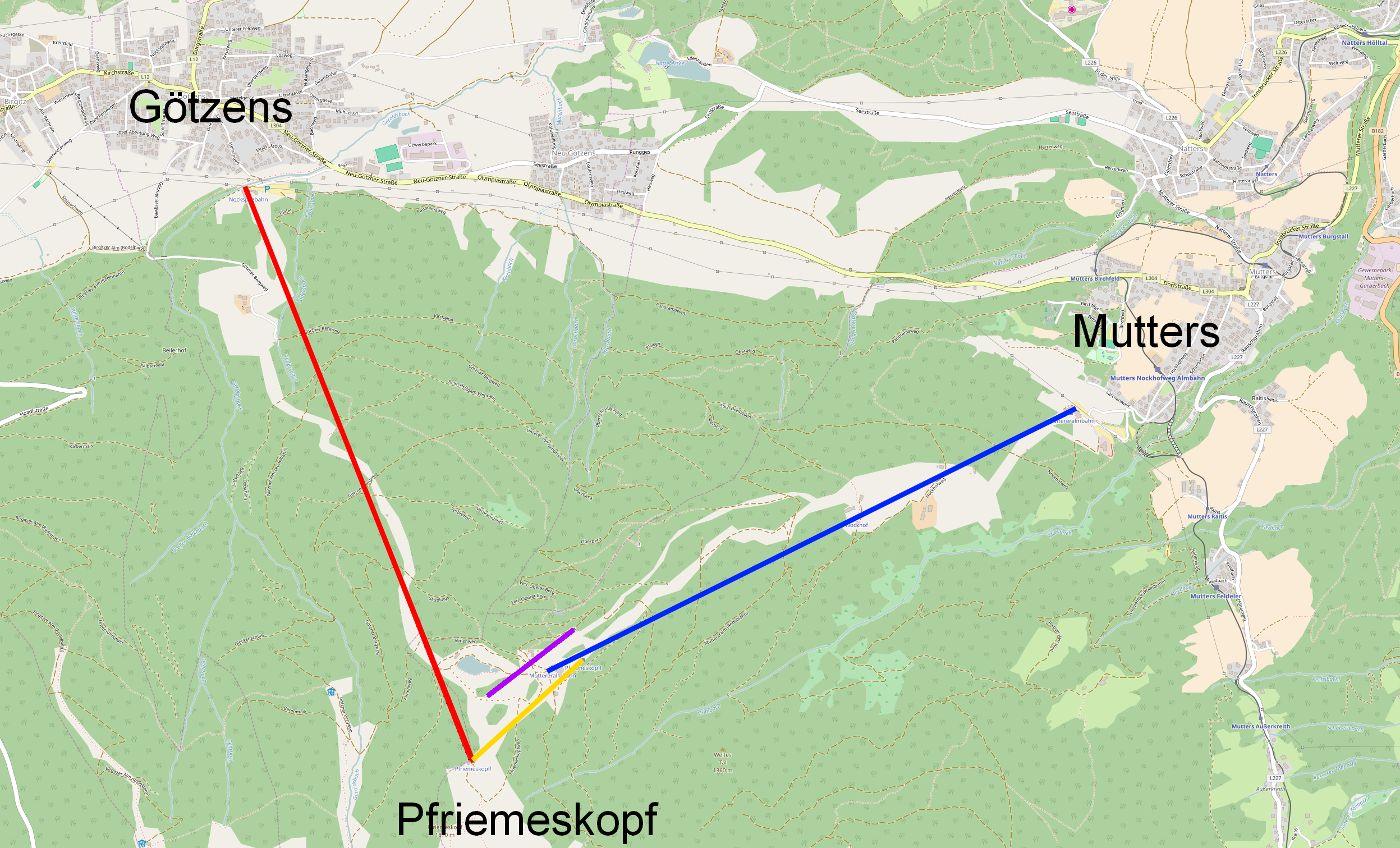 Muttereralmbahnund andere This map may be incomplete, and may contain errors. Don't rely solely on it for navigation.